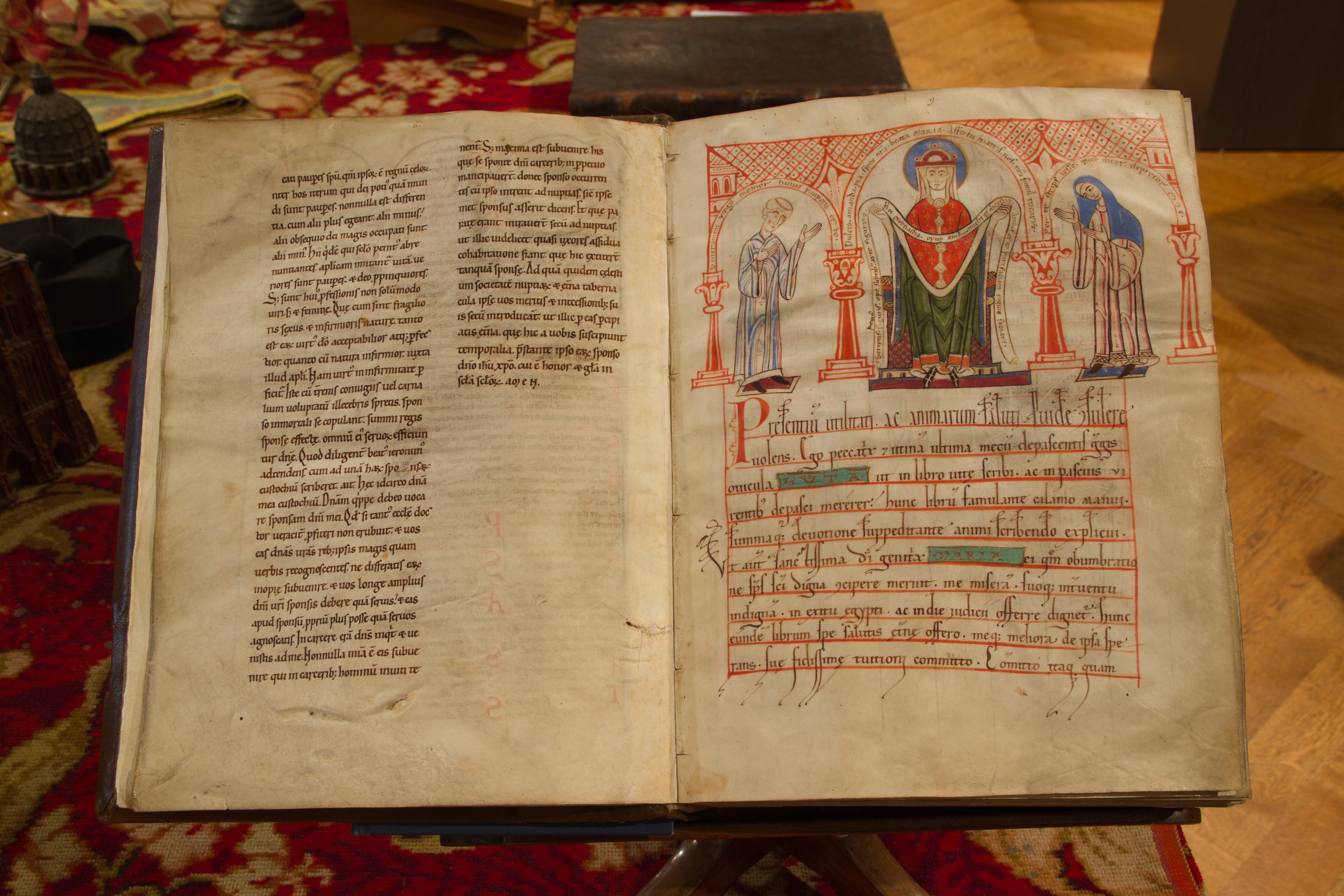 Codex Guta-Sintram. Manuscrit sur parchemin, 1154. Ouvrage écrit par la nonne Guta von Schwarzenthann (à droite) et illustré par le moine Sintram von Marbach (à gauche). Il a appartenu aux chanoinesses du monastère de Schwartzenthann (Haut-Rhin).